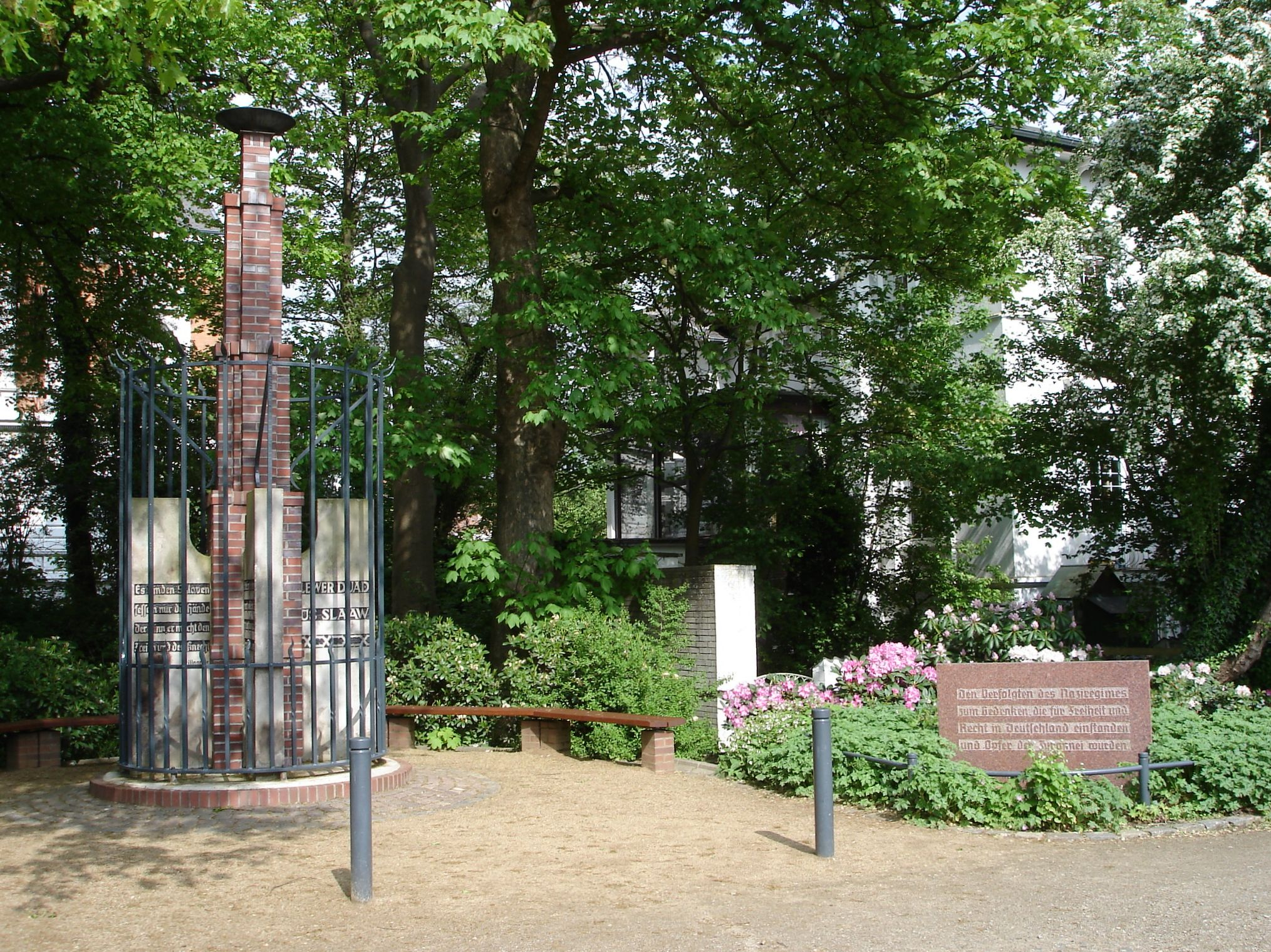 Itzehoe, Germany Denkmal für die Opfer des Nationalsozialismus Das erste Denkmal (1946) für die Opfer des Nationalsozialismus in Norddeutschland nach dem Krieg. Aufnahme am neuen Standort nach dem Wiederaufbau. Inschriften am ursprünglichen Denkmal: DEN OPFERN DES NATIONAL SOZIALISMUS LEWER DUAD ÜS SLAAW Wo das Recht ist, da wohnen von selber schon Freie. Und im mer, wo Freie sind Waltet das Recht Ferdinand Freiligrath Der Mensch ist frei geschaffen, ist frei Und wär er in Ketten geboren Schiller Nur der verdient sich Freiheit und das Leben, Der täglich sie erobern muß Goethe Und Freie seid ihr nicht geworden Wenn ihr das Recht nicht festgestellt Ludwig Uhland Es binden Sklaven fesseln nur die Hände der Sinn, er macht den Freien und den Knecht Grillparzer Echte Propheten haben manchmal falsche Pro pheten haben immer fanatische Anhänger Marie von Ebner-Eschenbach Inschrift am Ergänzungsgedenkstein: Den Verfolgten des Naziregimes zum Gedenken, die für Freiheit und Recht in Deutschland einstanden und Opfer der Tyrannei wurden.